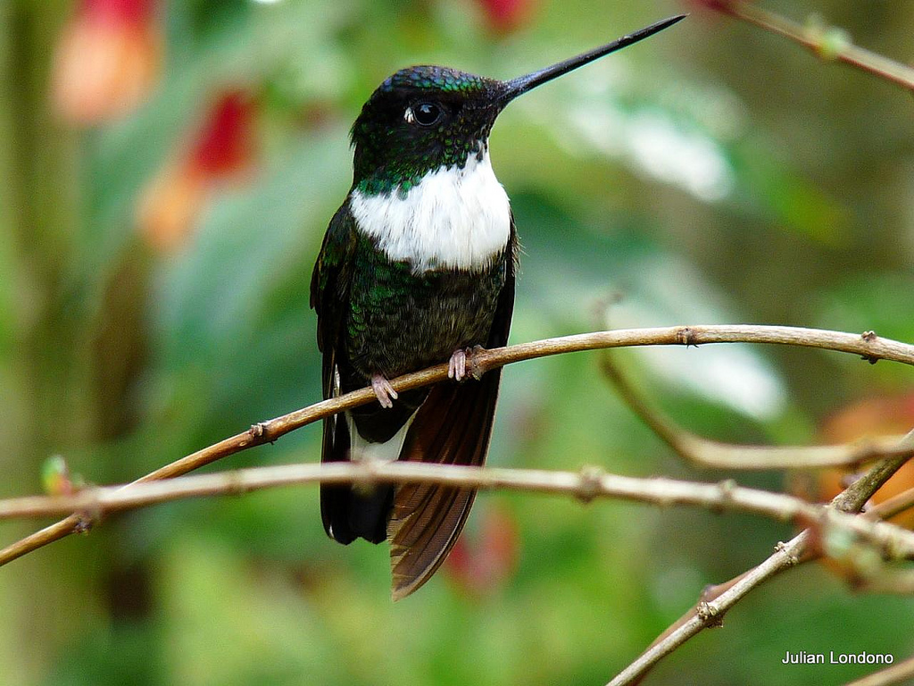 Tomada en el Mirador de los Colibríes. Recinto del Pensamiento. Manizales, Colombia. Escuche el canto y vea el mapa de distribución de ésta especie aquí: Disfrute con más fotos de ésta especie aquí: SELECTED HUMMINGBIRDS Fotografía espontánea y al natural. Foto sin recortes o postprocesos.